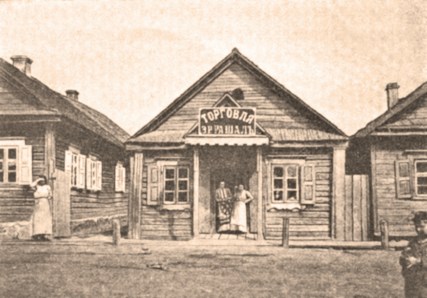 Беларуская (тарашкевіца): Пухавічы (Puchavičy), пляц Рынак (plac Rynak). Крама